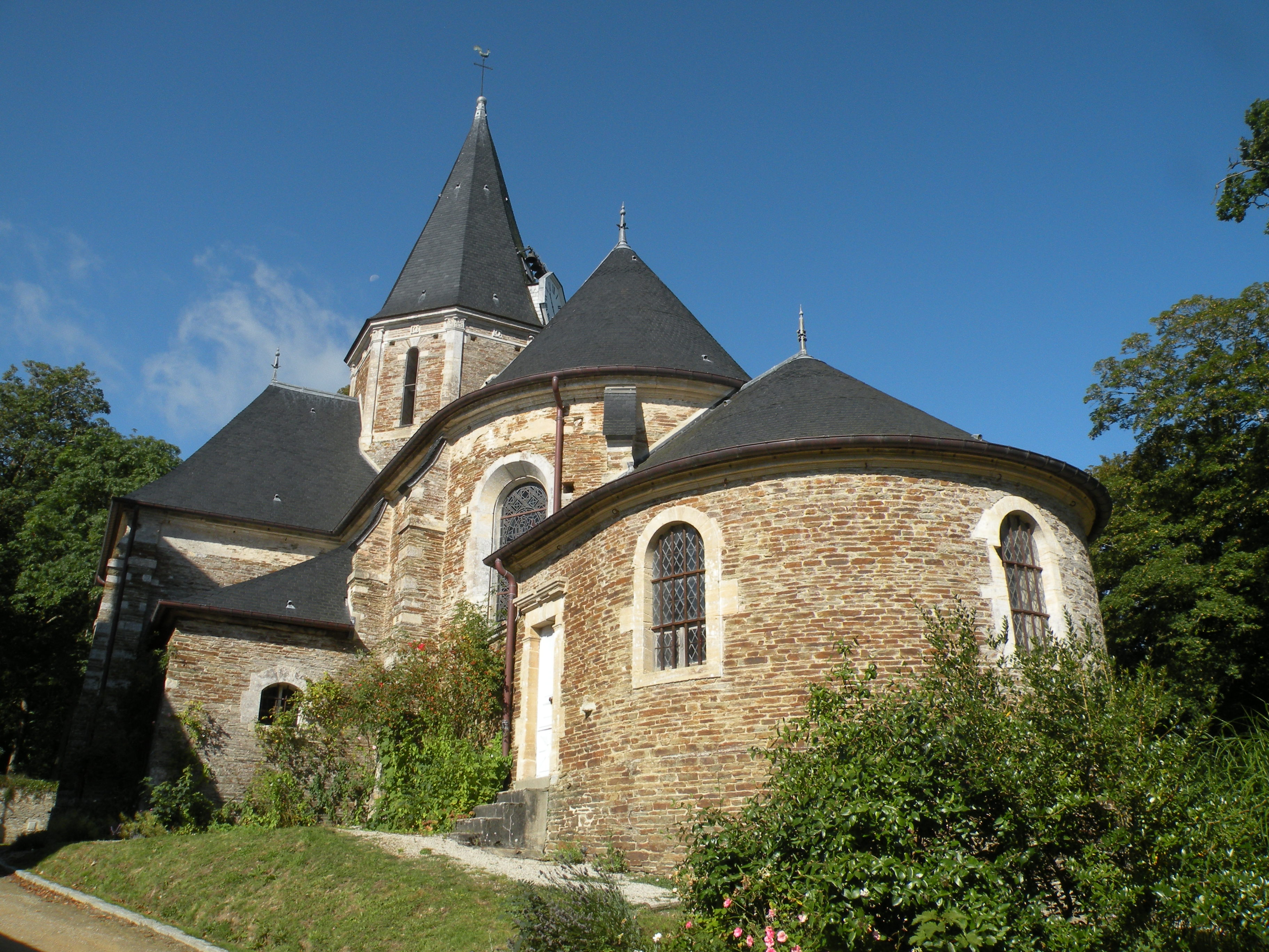 Église Saint-Martin de Balleroy